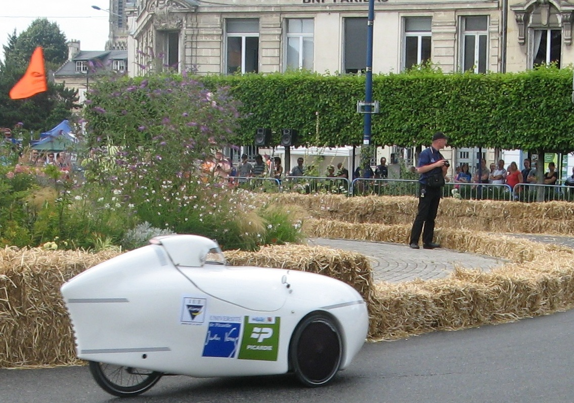 essais en ville, eco marathon